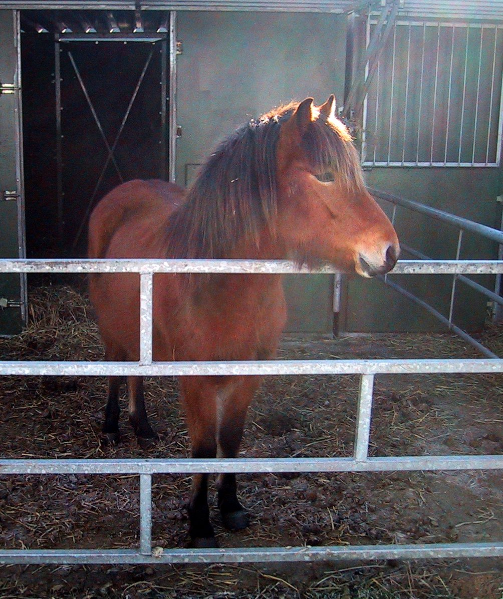 eigene Fotografie --Mijobe✉ 20:36, 29. Jan 2006 (CET)